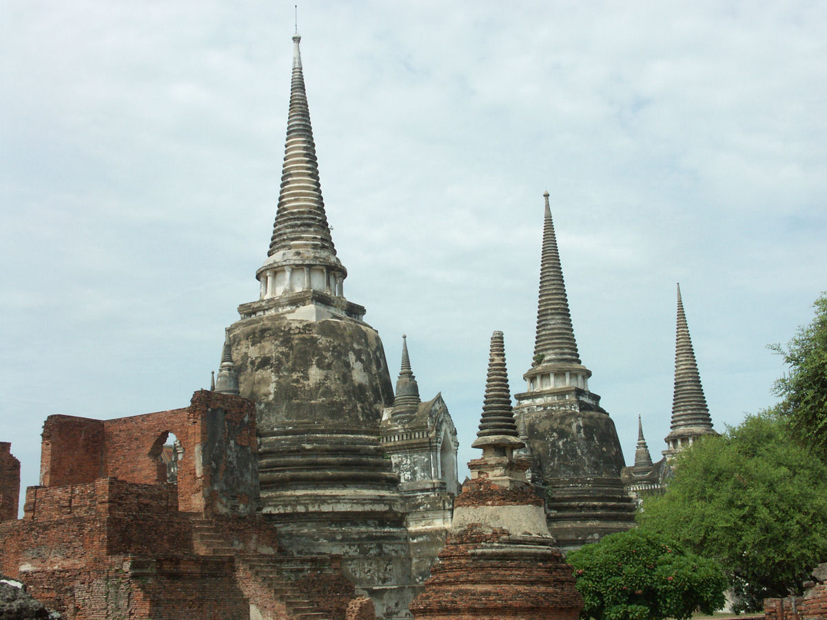 Wat Phra Si Sanphet (วัดพระศรีสรรเพชญ์), Ayutthaya, Thailand